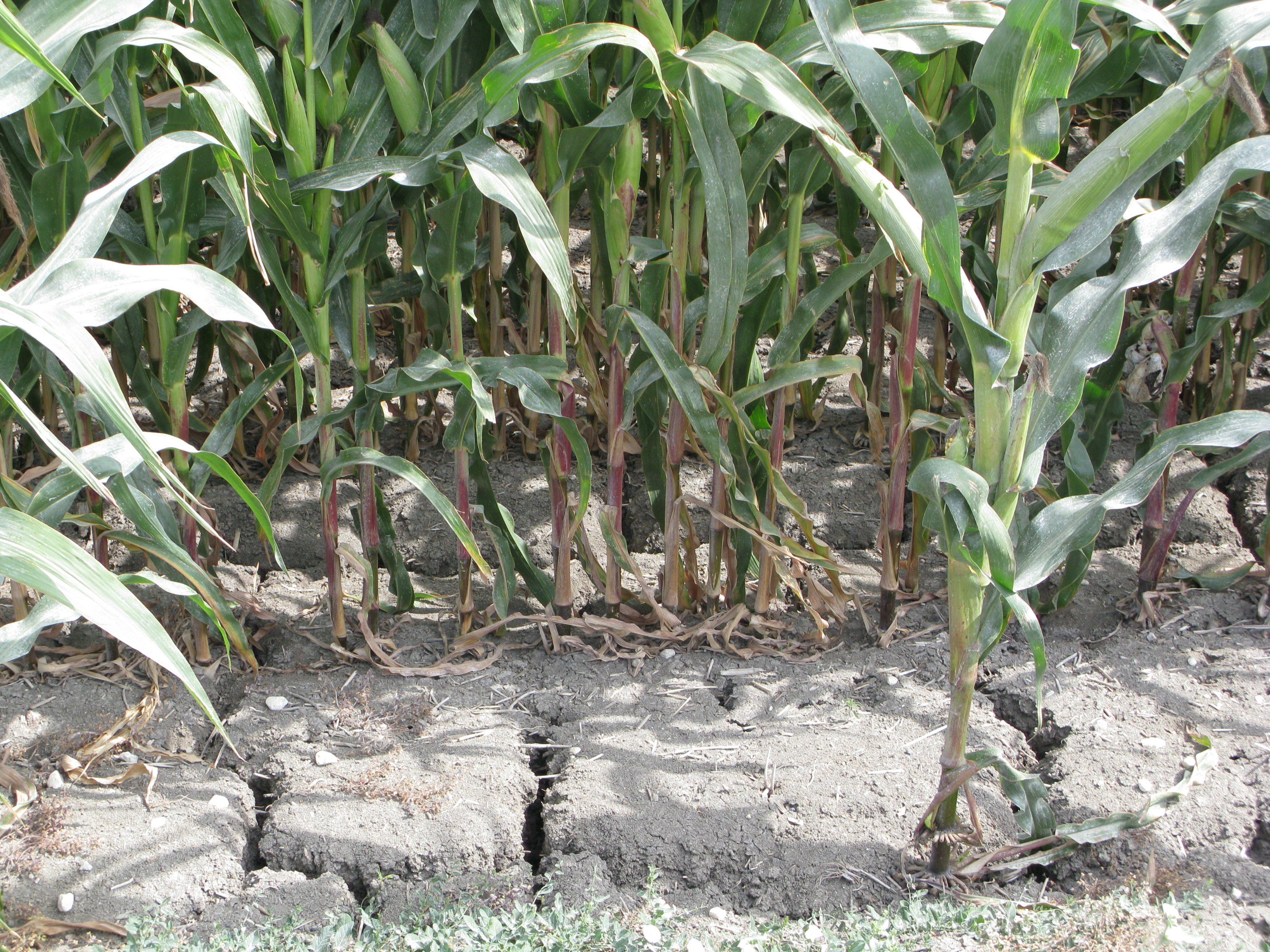 Sol d'un champ de maïs, en période sèche.